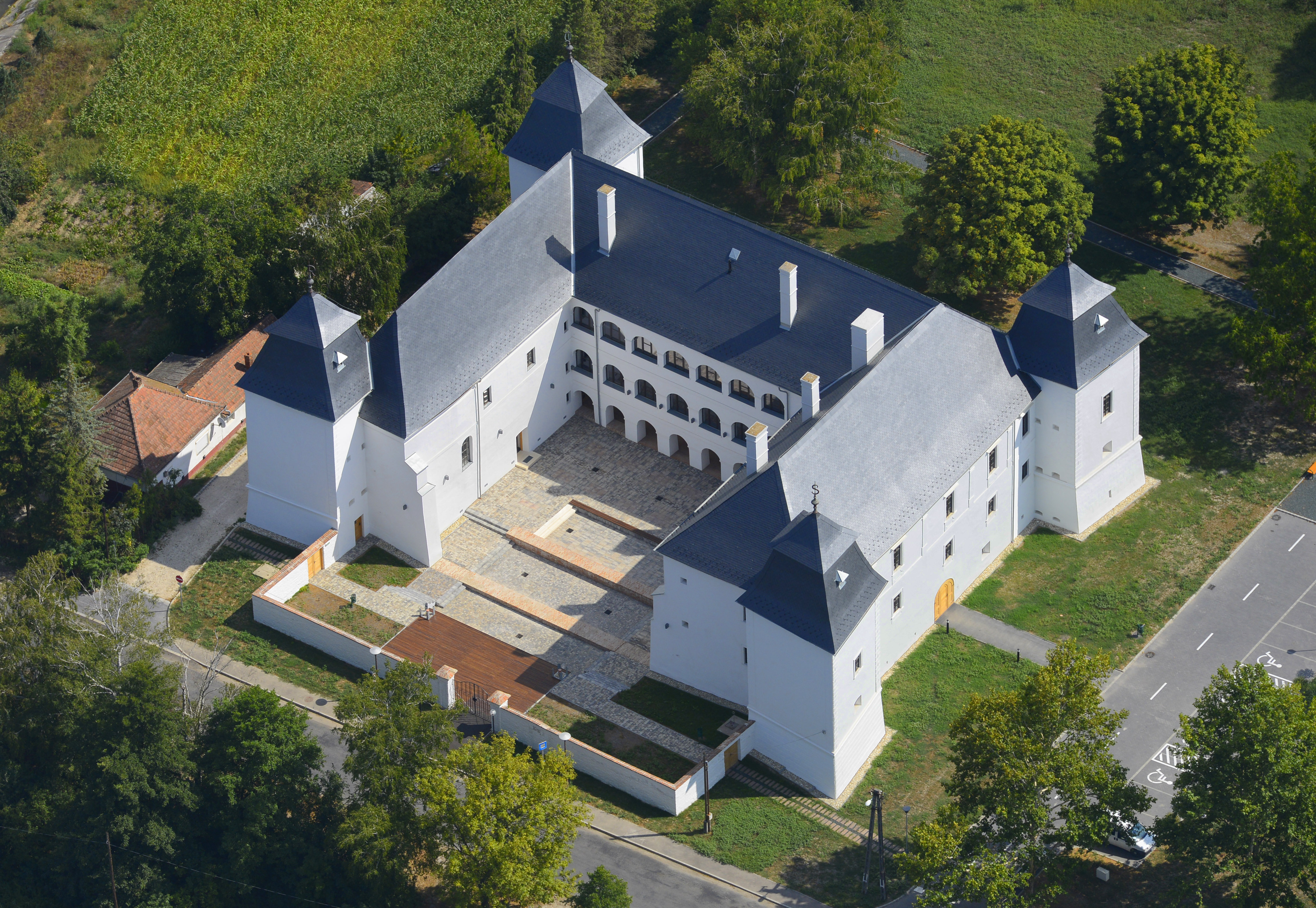 Az egervári várkastély légi felvételen